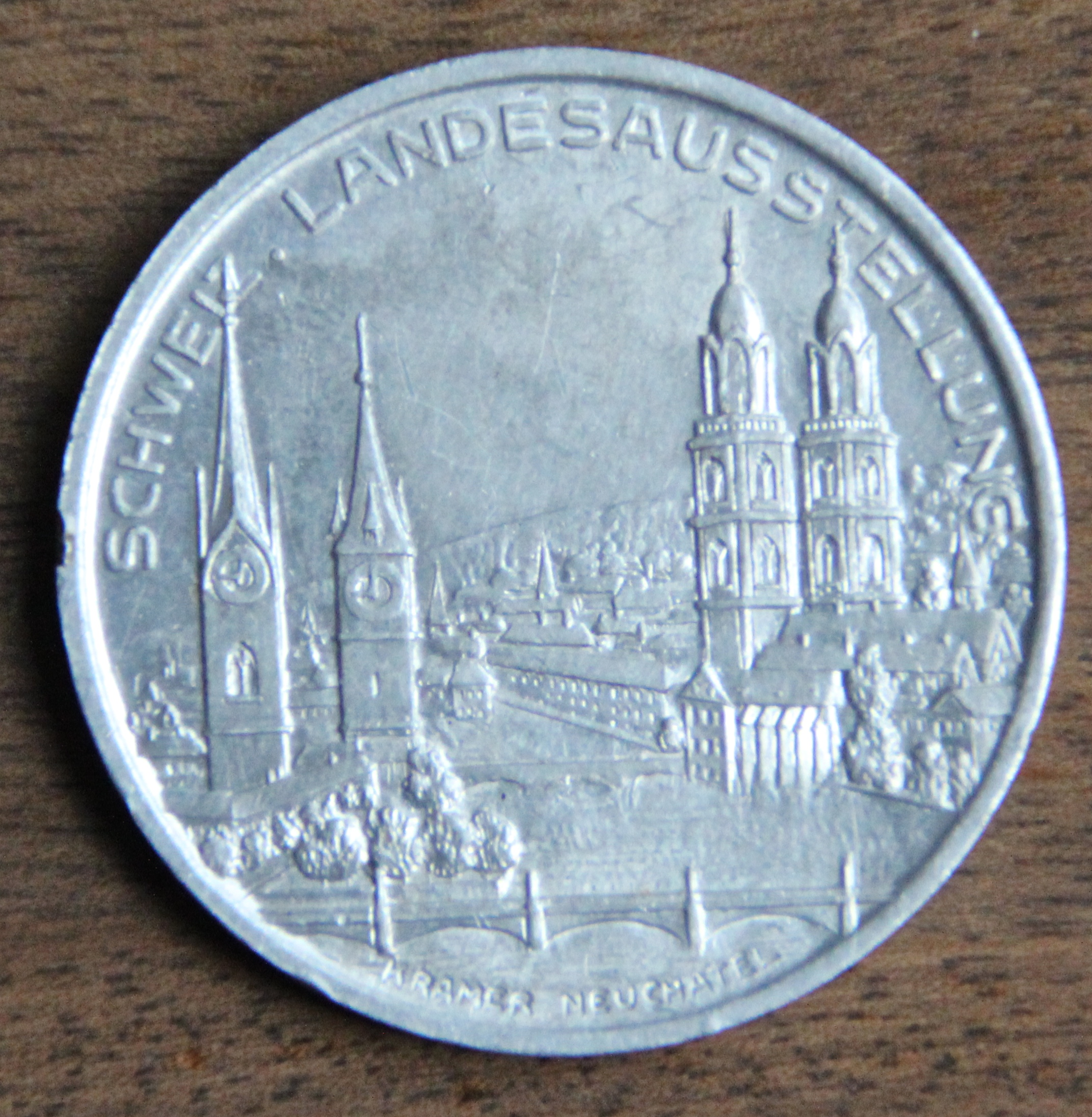 Schweizerische Landesausstellung 1939: Im "Aluminium Pavillon" an der Landi geprägte Alumünze